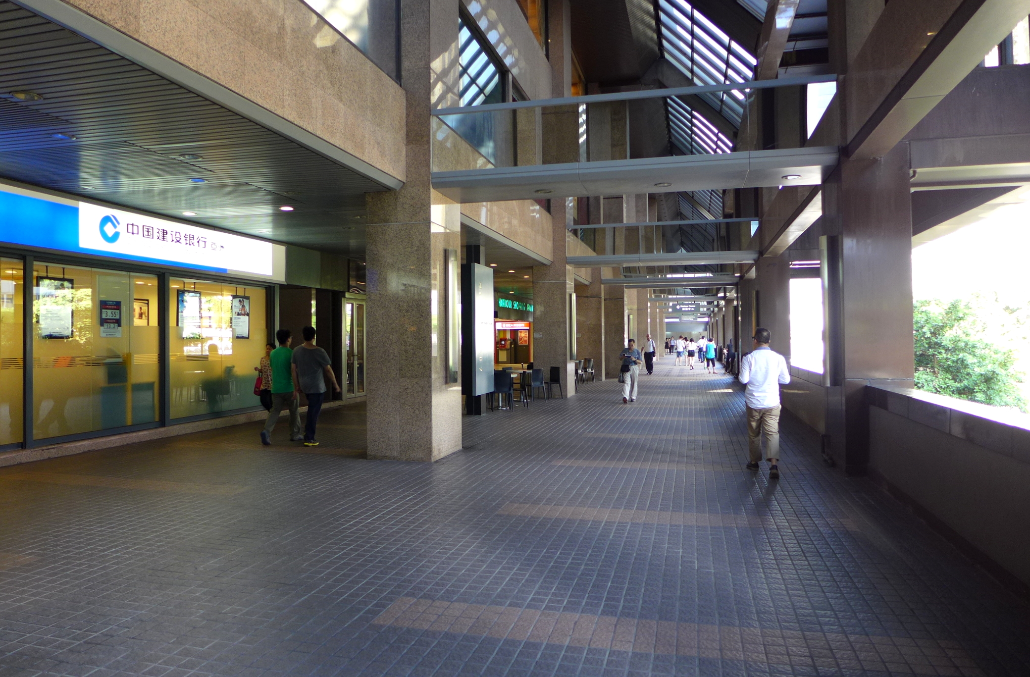 Harbour Centre Access